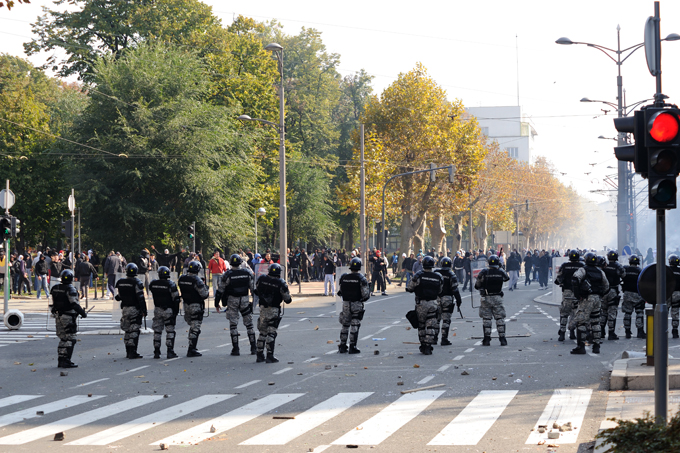 Foto: Wolfgang Klotz / Heinrich-Böll-Stiftung